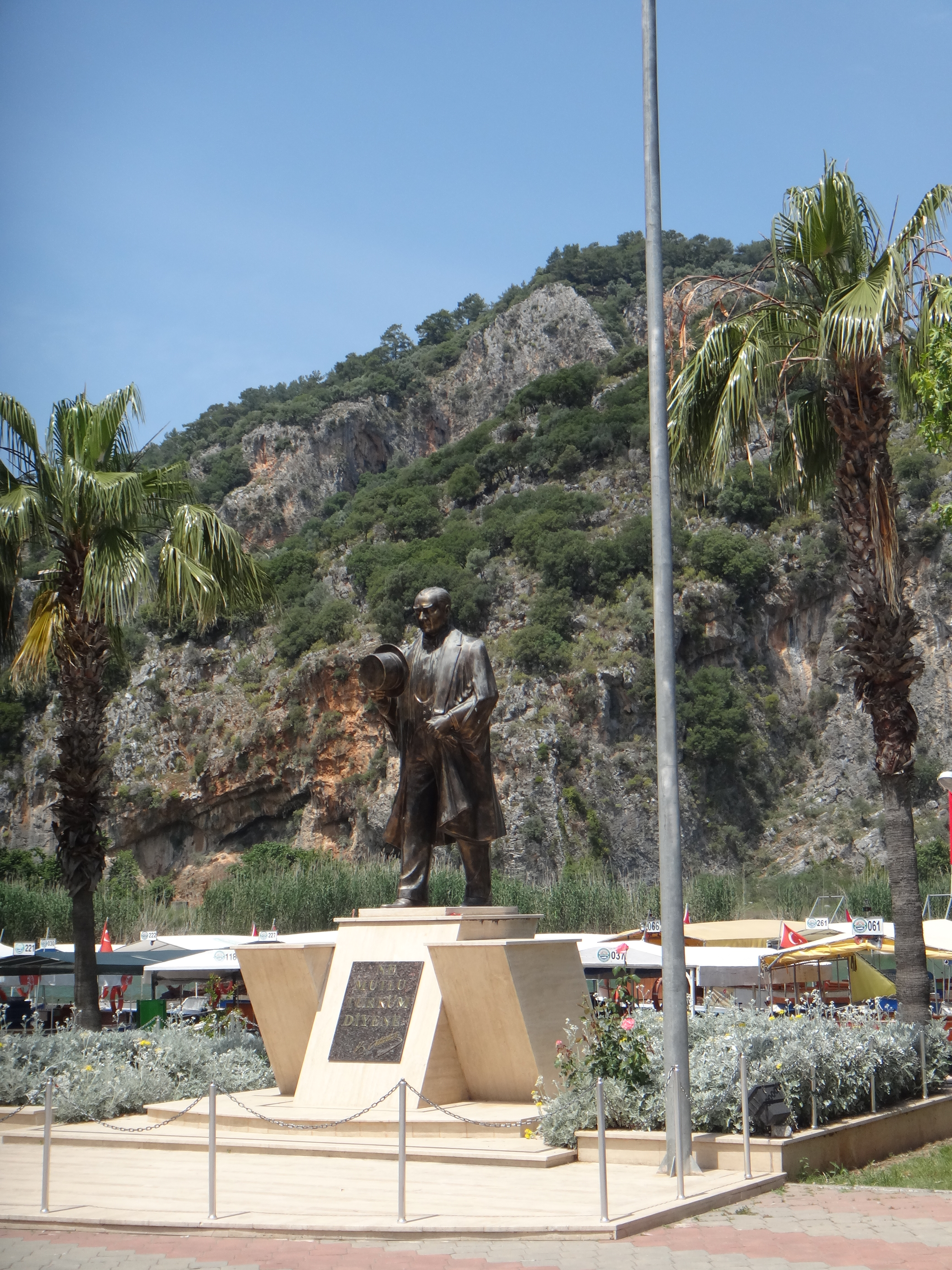 Dalyan Belediyesi, 48600 Dalyan/Ortaca/Muğla Province, Turkey